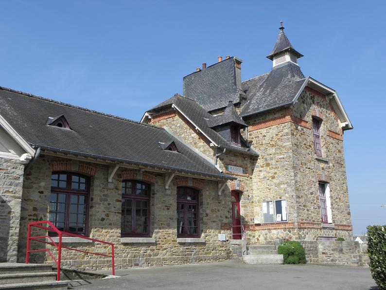 Mairie d'Andouillé-Neuville (Ille-et-Vilaine, Bretagne, France).